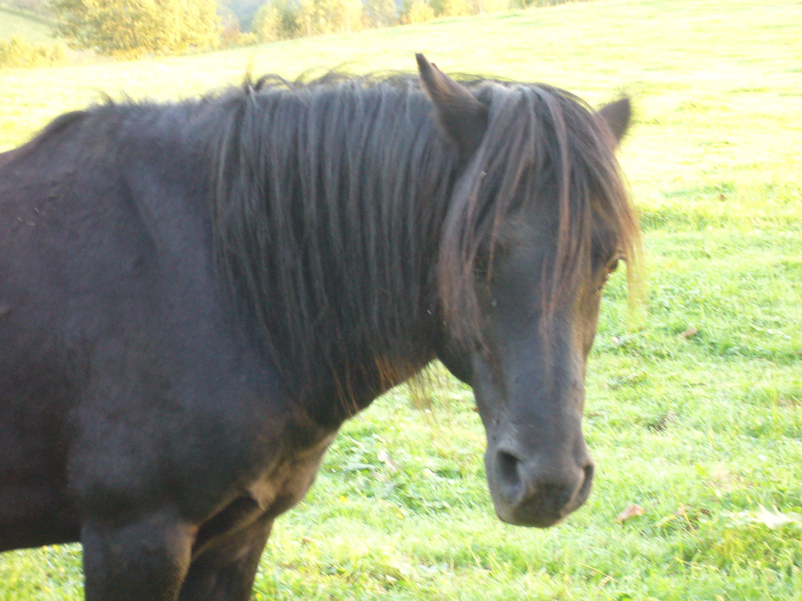 Pottoka ar baten burua‹›